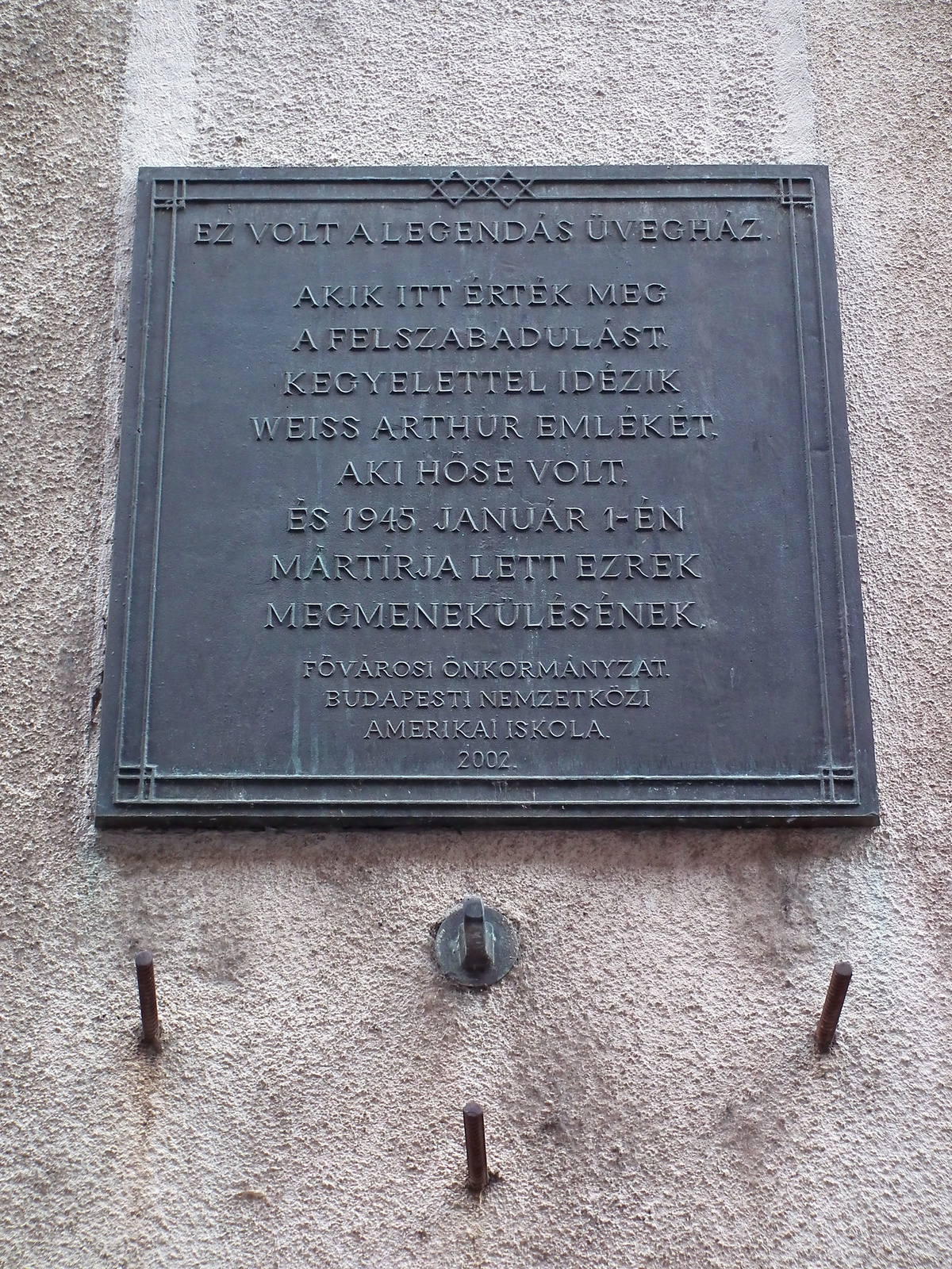 Lakó- és irodaház, az ún. "Üvegház" (Budapest 5, Vadász utca 29.) This is a photo of a monument in Hungary, Identifier: 12313